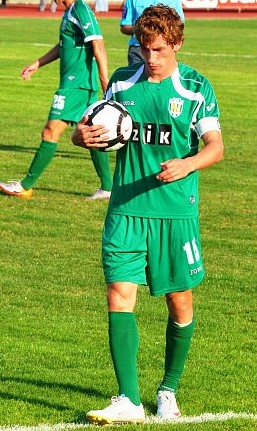 Тарас Петривский — украинский футболист.